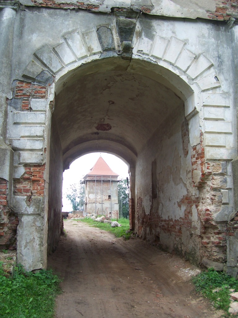 Lubcza_Castle